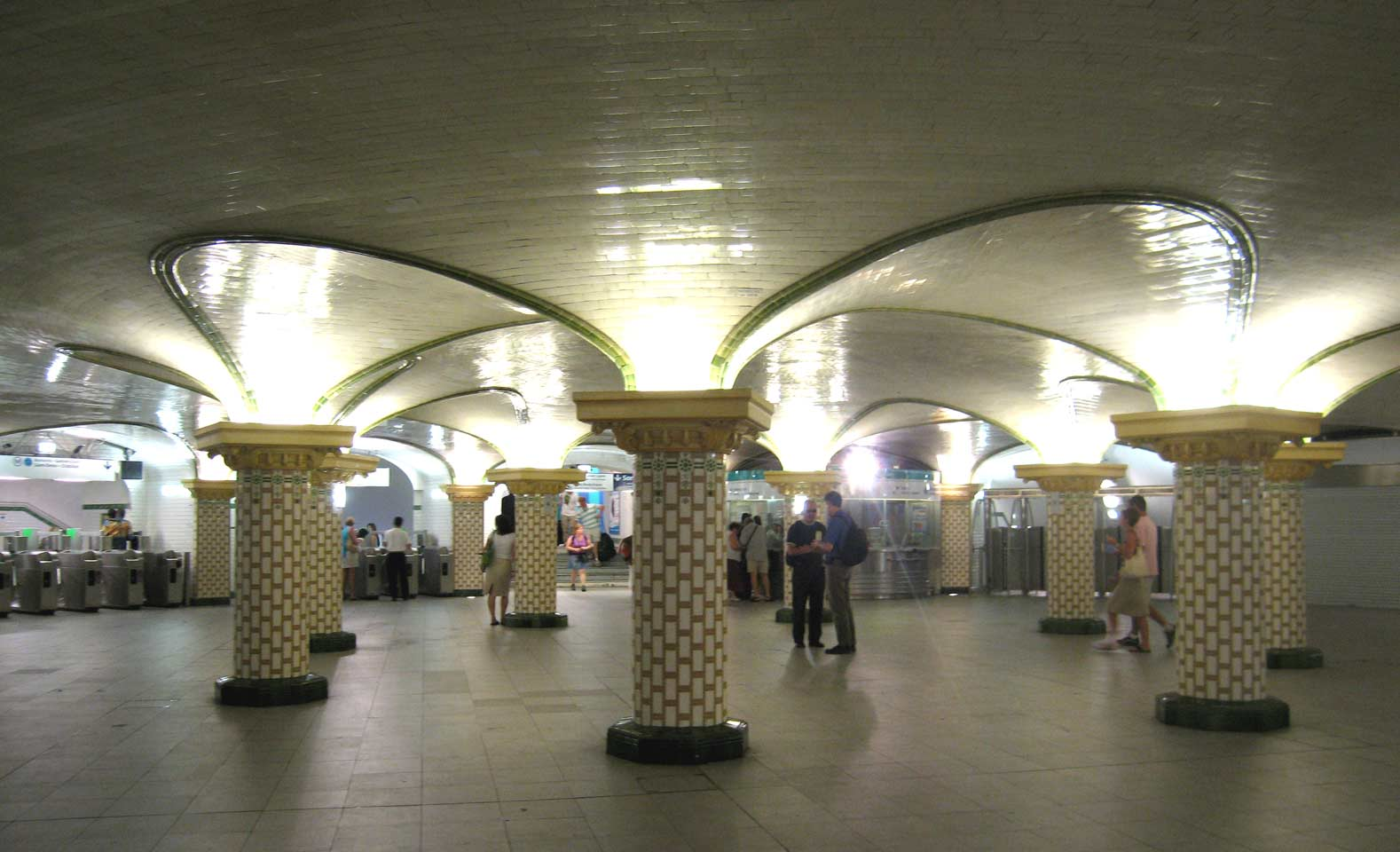 Metro de Paris : Salle de correspondance souterraine de la station Saint Lazare, dite "La rotonde", créée par la compagnie du Nord/Sud Lieu : Paris, France Date : Juin 2006 Auteur : Pline photo personnelle